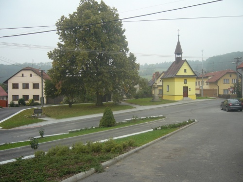 náves